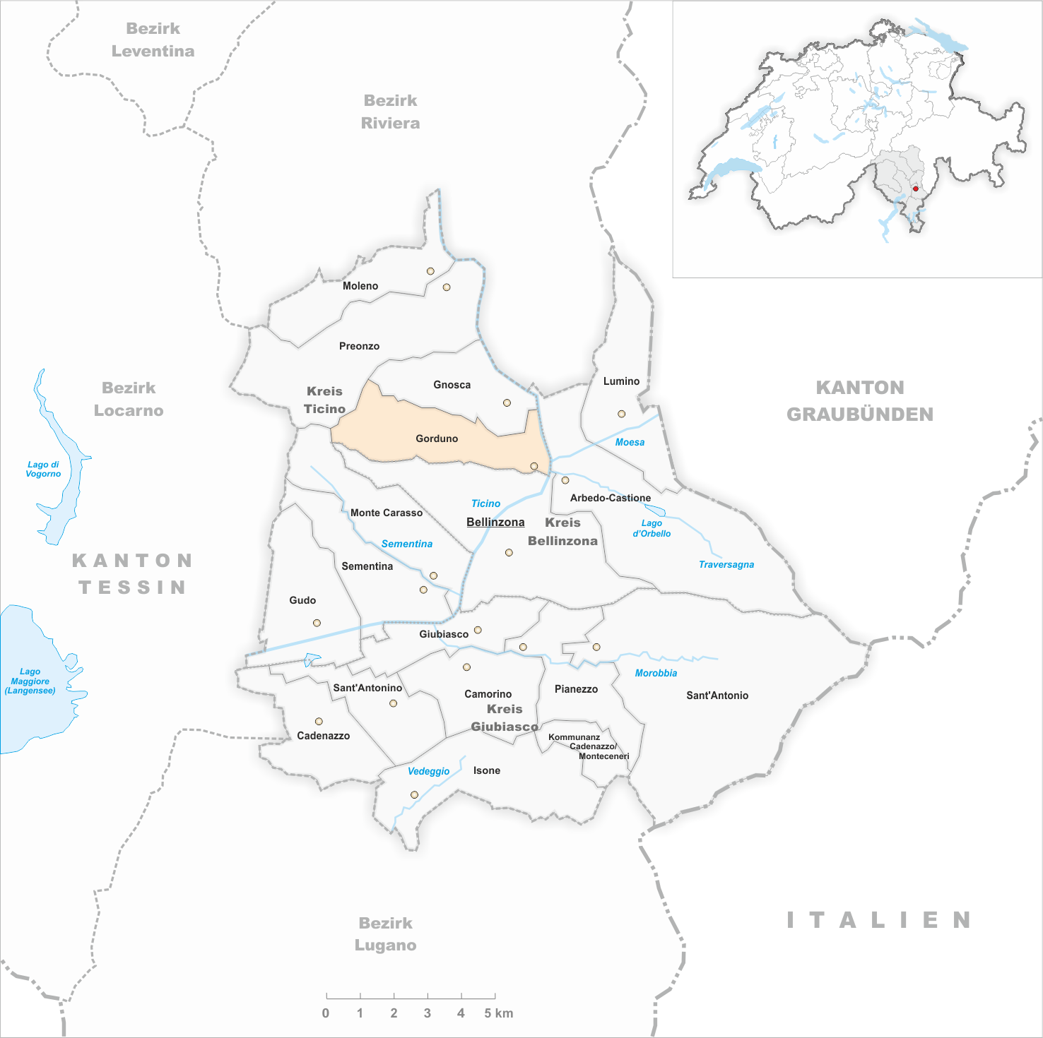 Municipality Gorduno